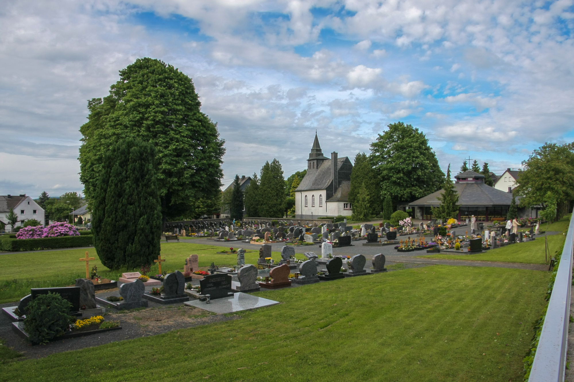 Friedhof der Gemeinde Höhn im Westerwald. Im Hintergrund die evangelische Kirche, rechts daneben die Friedhofshalle